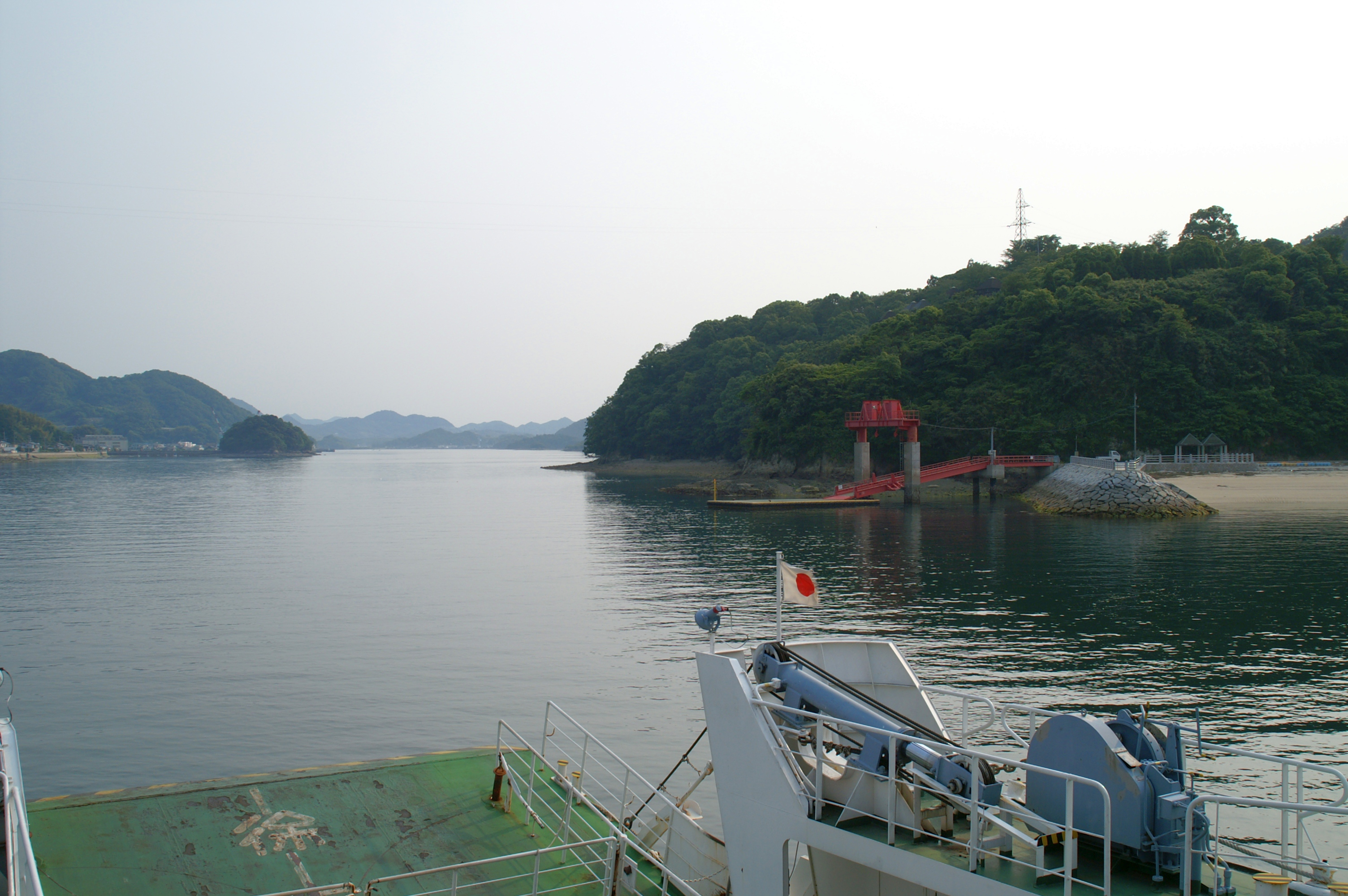 生野島。